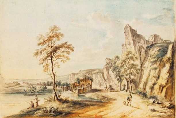 Moulin à foulon au bas des roches de Plombières, village près de Dijon sur le grand chemin de Paris, dessin de Jean-Baptiste Lallemand